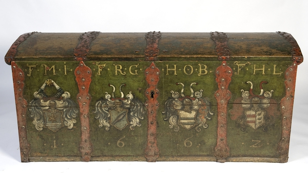 Kiste datert 1662 med våpenskjold for Ove Bielke til Austråt og hans tre hustruer. Lengde 163 cm. Innkommet til Norsk Folkemuseum fra Støren i Sør-Trøndelag. NF.1930-0457.